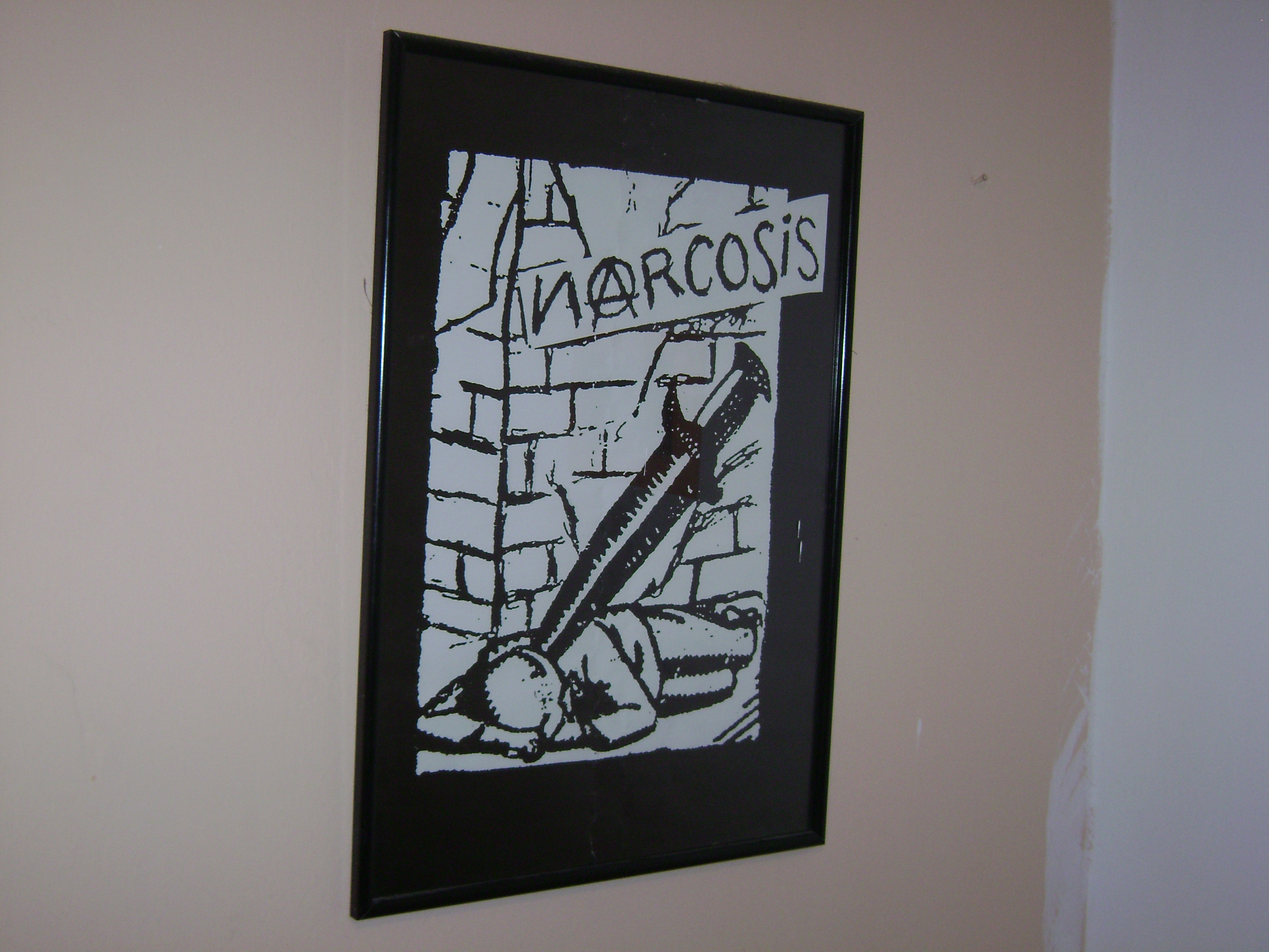 Imagen de un afiche original de la banda enmarcado en casa de un coleccionista.